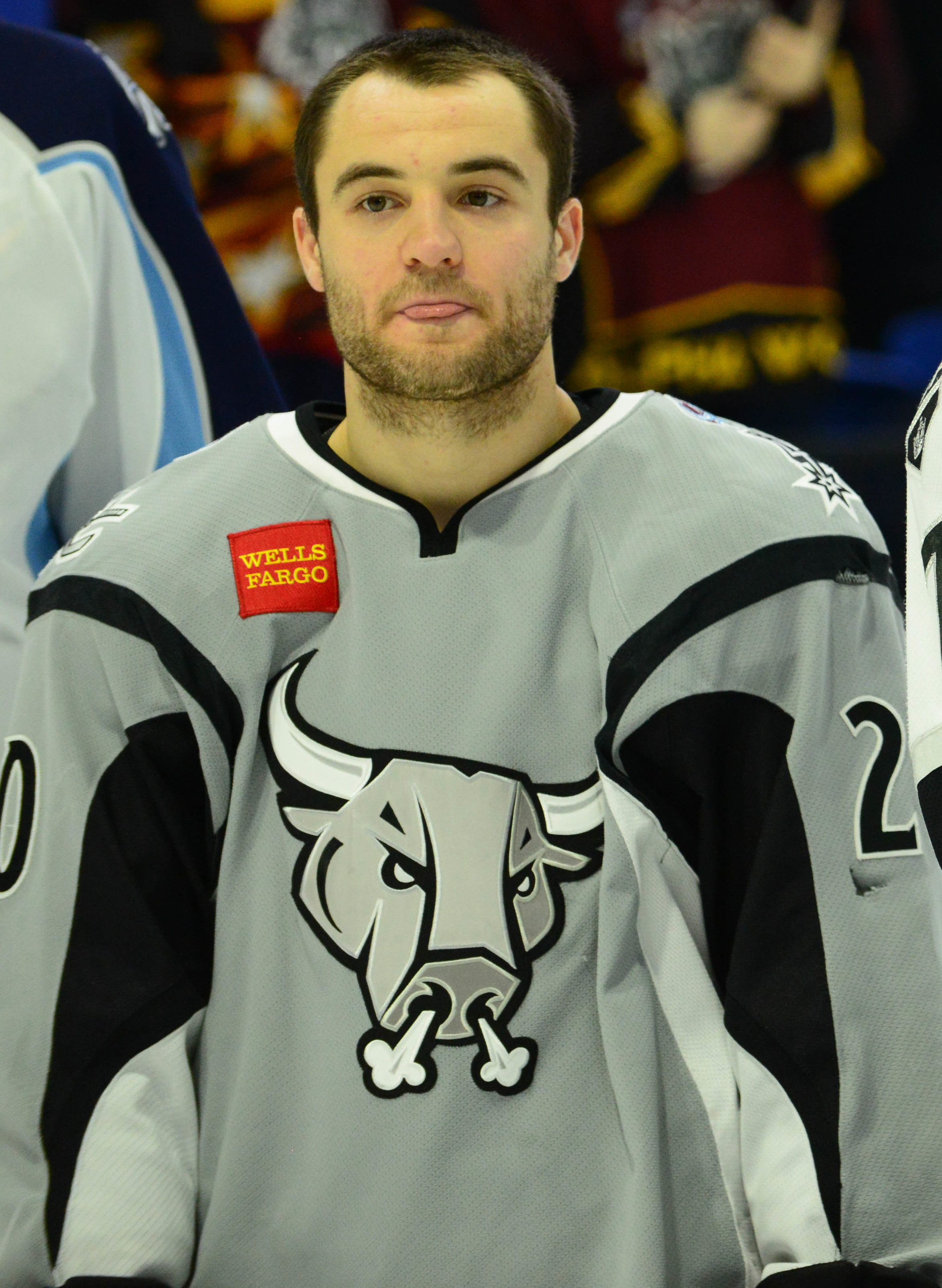 (Bryan Peck/ AHL)